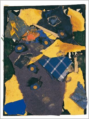 Klebebild abstraktlabel QS:Lde,"Klebebild abstrakt"